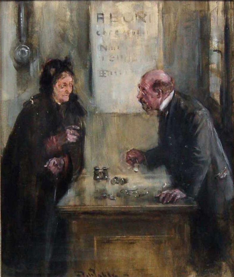 Beim Optiker. Mischtechnik, undeutlich signiert. 31 x 25,5 cm